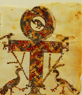 Cruz copta, cruz Anj, crux ansata o cruz ansada del Codex Glazier (s. IV-V e.c.)